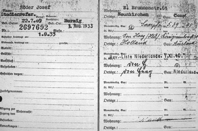 Josef Röders NSDAP-Mitgliedskartei